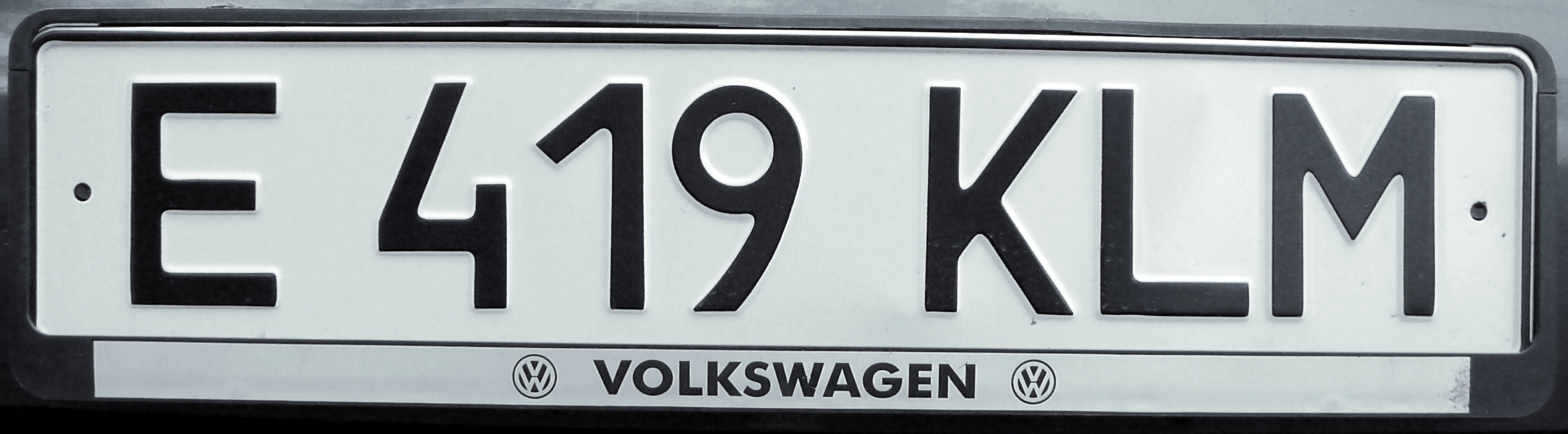 Казахстанский автомобильный номер выданный на физическое лицо. Номер "E419KLM". Буква "E" - перед цифрами обозначает "Атырауская область"